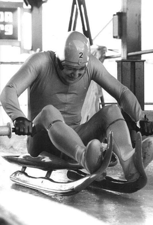 Thomas Jakob ADN-ZB Hiekel 16.10.1987-Bez. Suhl: Saisonauftakt im Rennschlittensport-"Start frei" für Thomas Jacob von SC Traktor Oberwiesenthal. Als Vorjahressieger war er beim Saisonauftakt auf der Oberhofer Kunsteisbahn um die "Schnelle Kufe" nach vier Rennläufen mit der Gesamtzeit von 2:59,889 min. erneut erfolgreich. Mit 44,463 s stellte er im dritten Lauf sogar einen neuen Bahnrekord auf. Foto von 1986 in Altenberg.